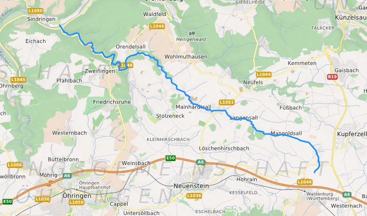 carte réalisée sur umap This map may be incomplete, and may contain errors. Don't rely solely on it for navigation.